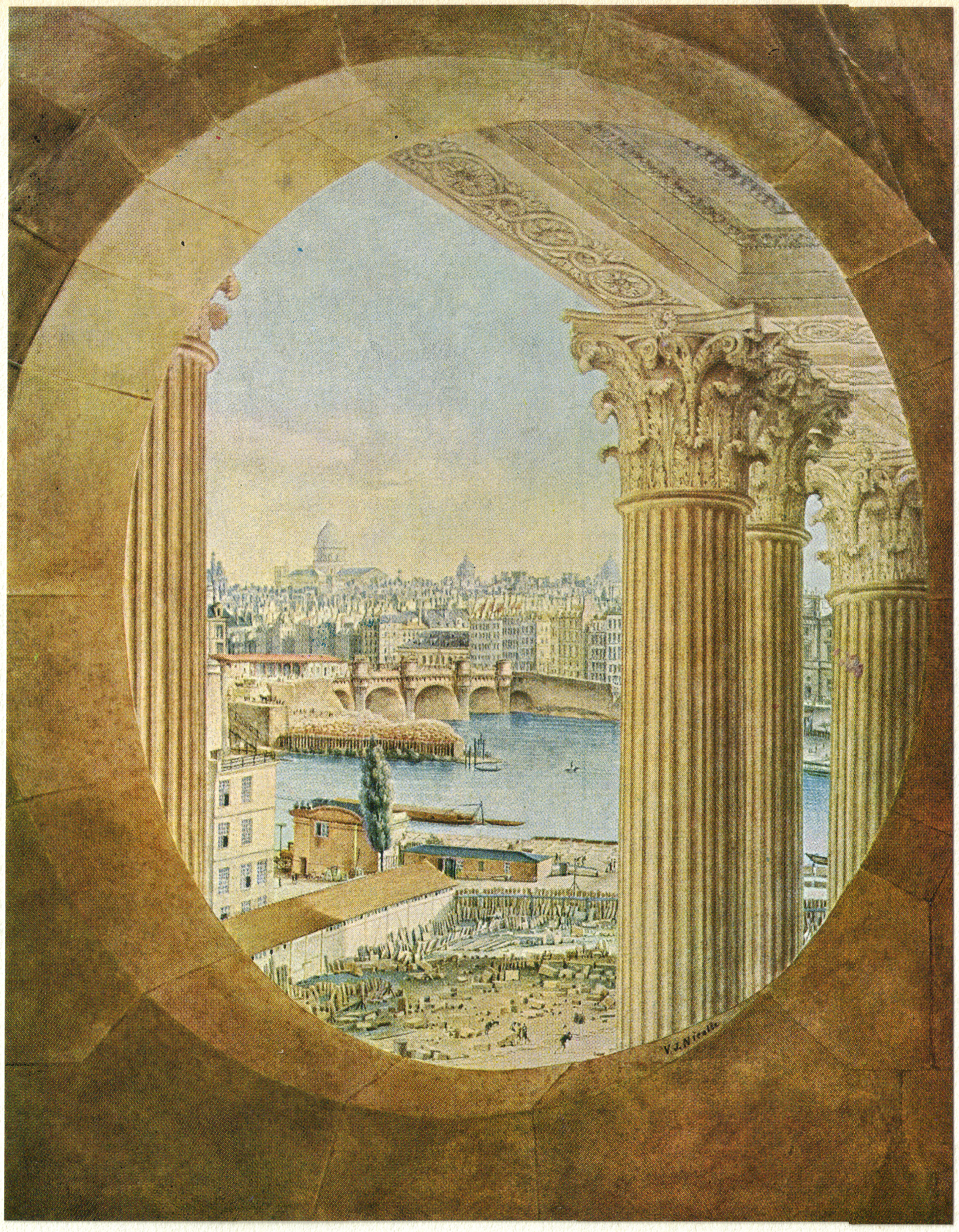 Vue de la Seine prise du Louvre - Auteur NICOLLE Victor-Jean (1754-1826). Peinture Hauteur 0,508m Largeur : 0,394m . Exposée au musée Carnavalet (Paris)